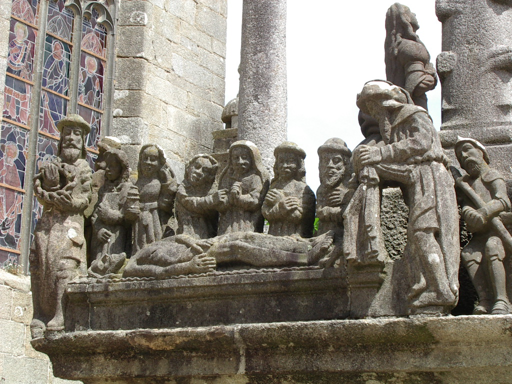 Eglise Notre-Dame ou Saint Thégonnec Saint Thégonnec